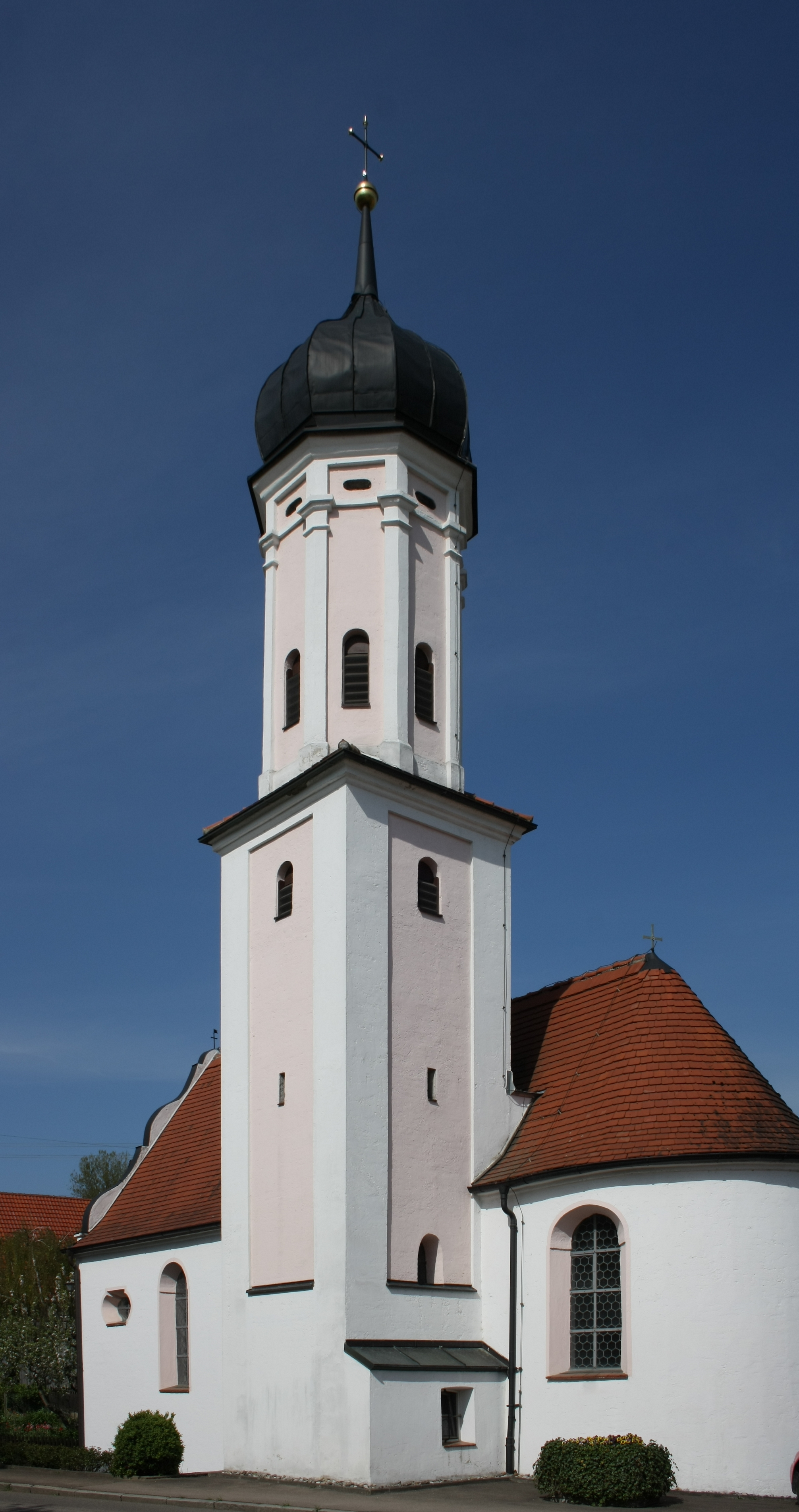 Katholische Filialkirche Hl. Dreifaltigkeit und St. Leonhard in Bocksberg, einem Ortsteil von Laugna im Landkreis Dillingen an der Donau (Bayern), Ansicht von Südosten